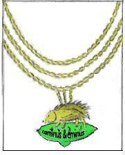 symbole de l'ordre du Porc-Épic fut institué par Louis de France, duc d'Orléans, en 1393.